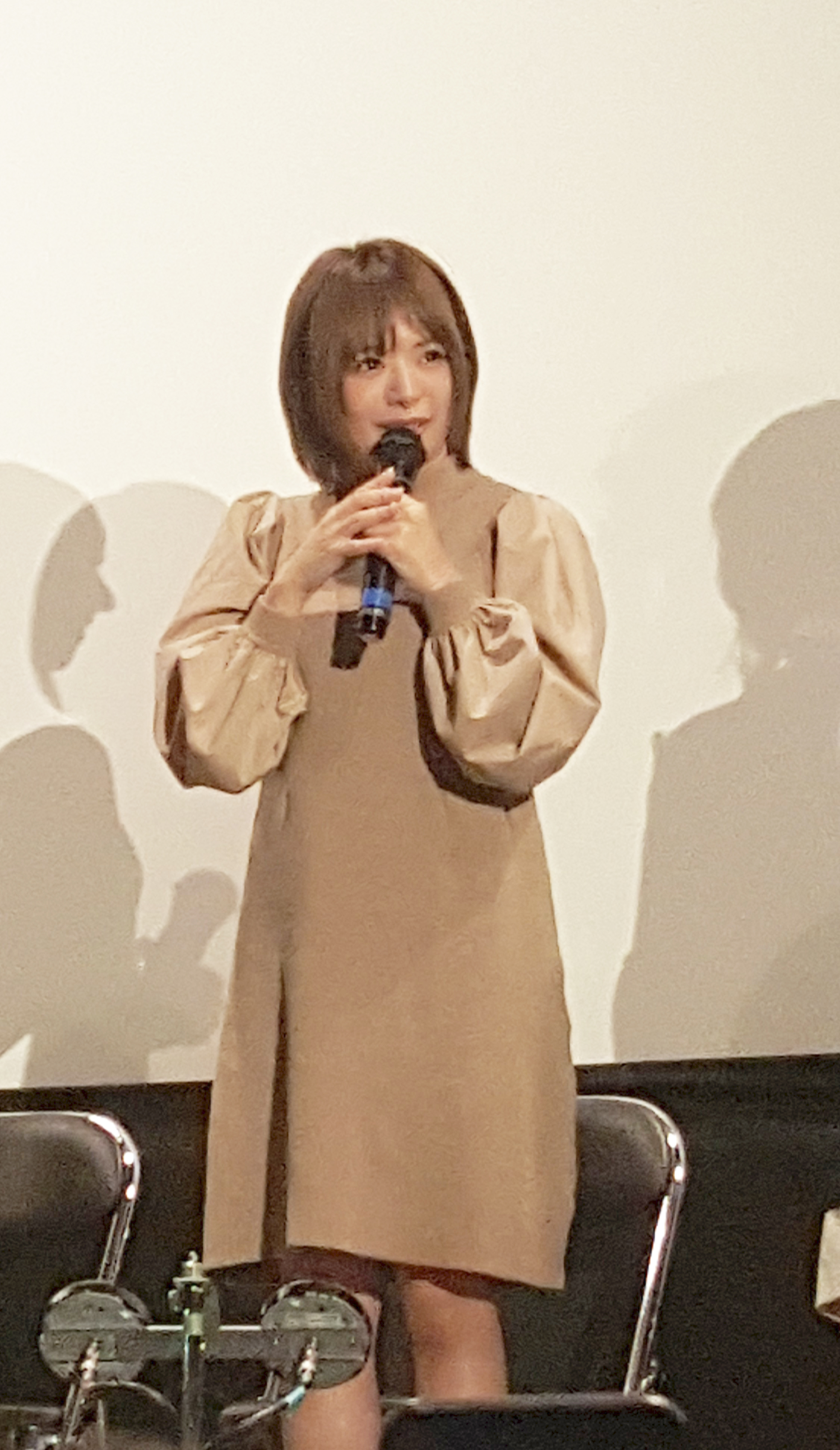 映画「バージン協奏曲 それゆけ純白パンツ!」公開舞台挨拶（2019年）